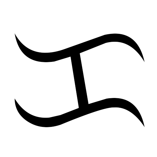 Isa sa mga simbolo sa alpabeto ng baybayin, ito ang KA.